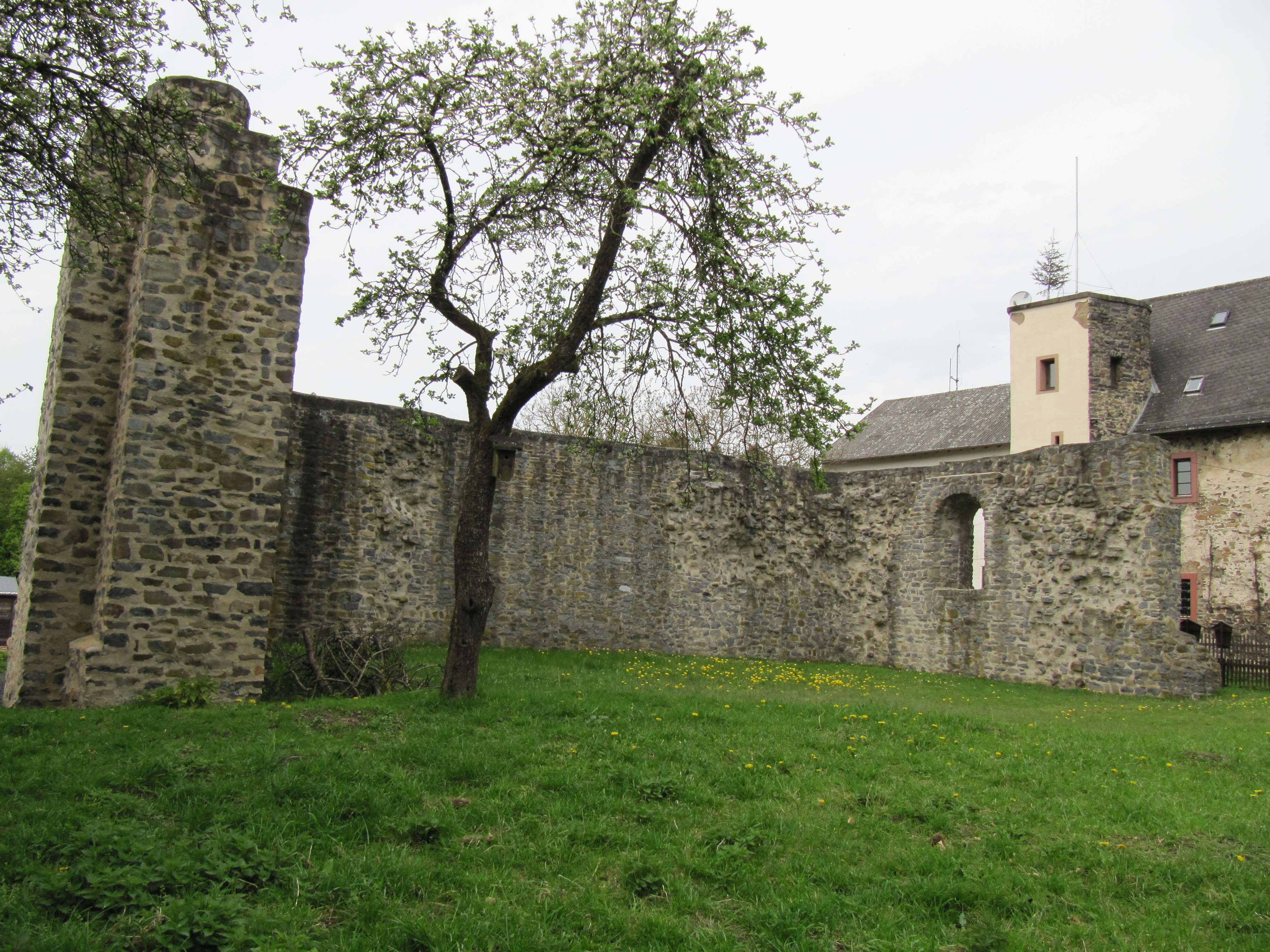 Klosterruine Beselich in Beselich – Ansicht vom Süden